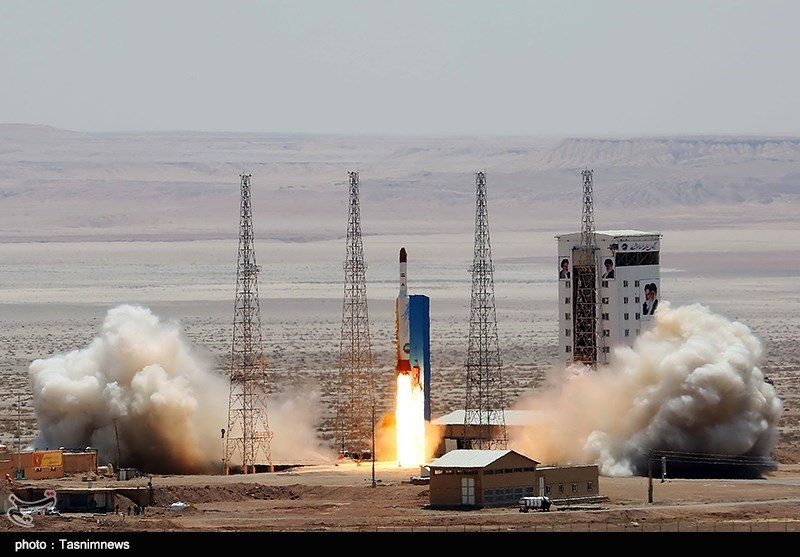 سیمرغ - افتتاح پایگاه ملی فضایی امام خمینی(ره)